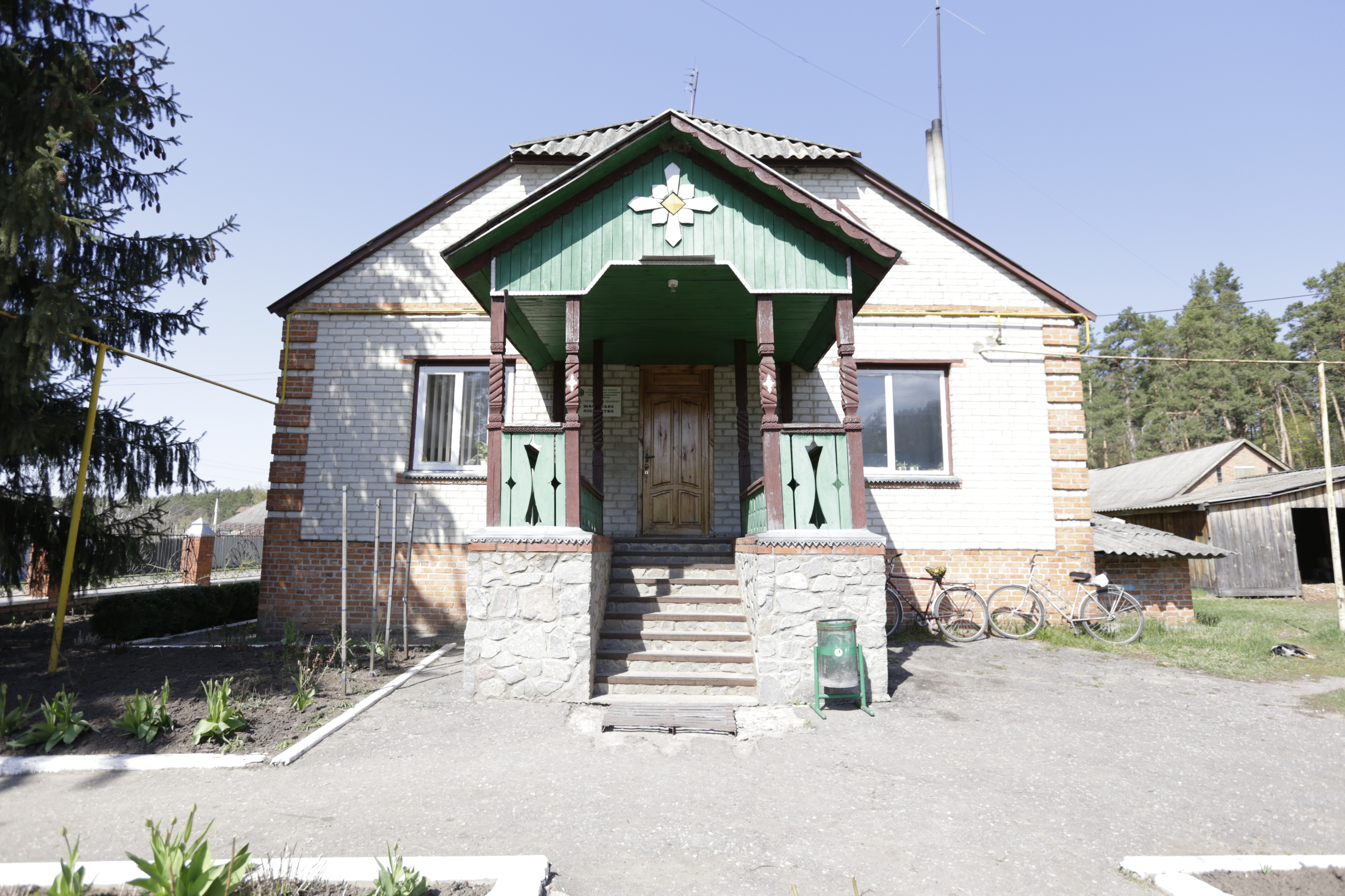 Харківська область - Богодухівський район - Шарівка - Лісництво